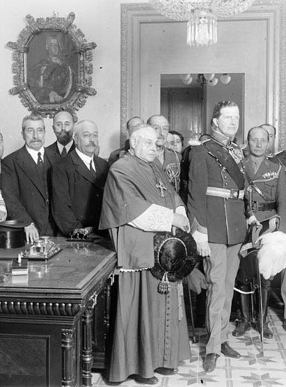 Imagen de Juan Álvarez de Sisternes, alcalde de Villafranca del Panadés, junto al infante Fernando de Baviera, el día de la celebración de la finalización de las obras de la Iglesia de San Juan de la misma villa. (1929)